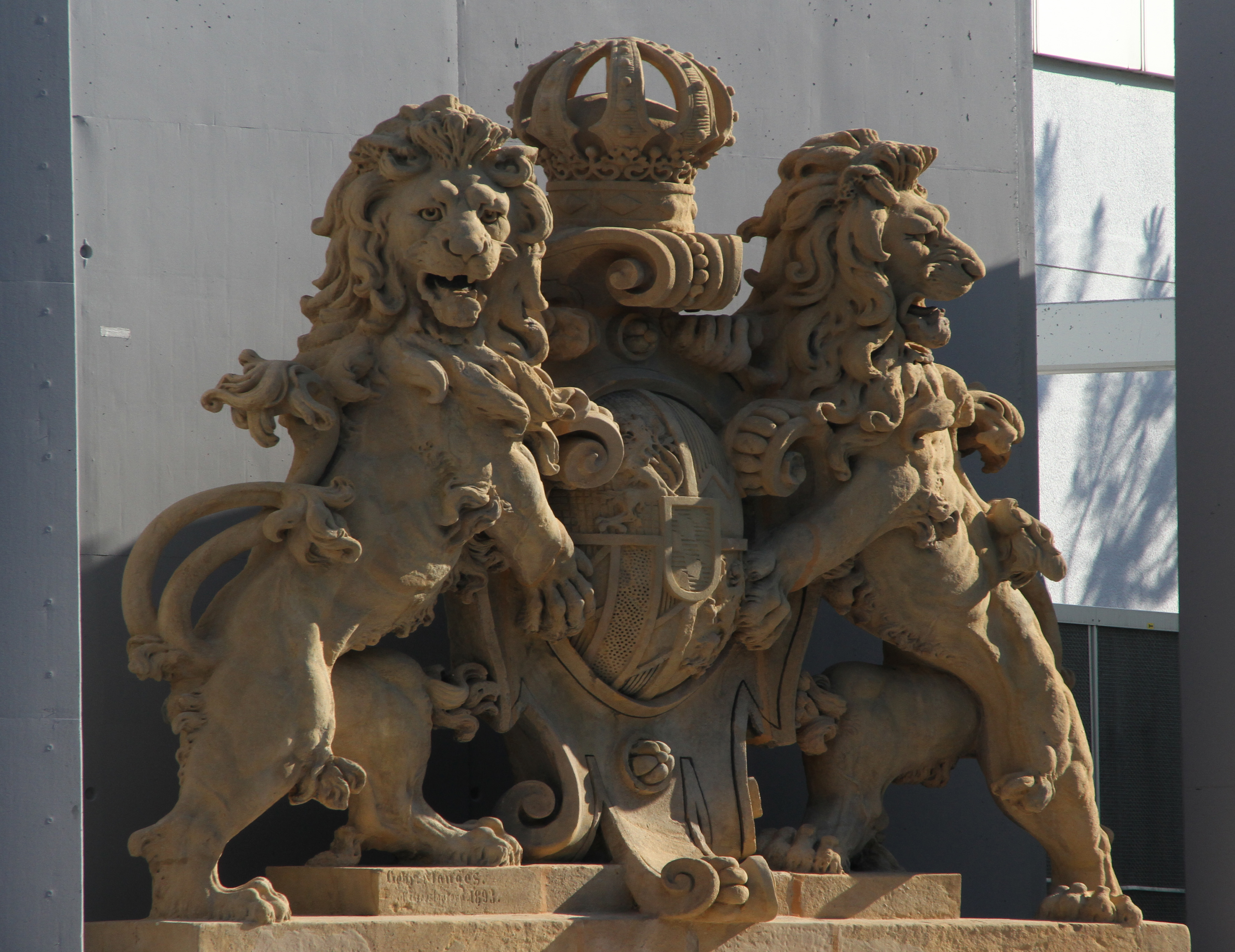 Die bayerischen Wappenlöwen beim ehemaligen Königlich-bayerisches Postamt in Pirmasens.